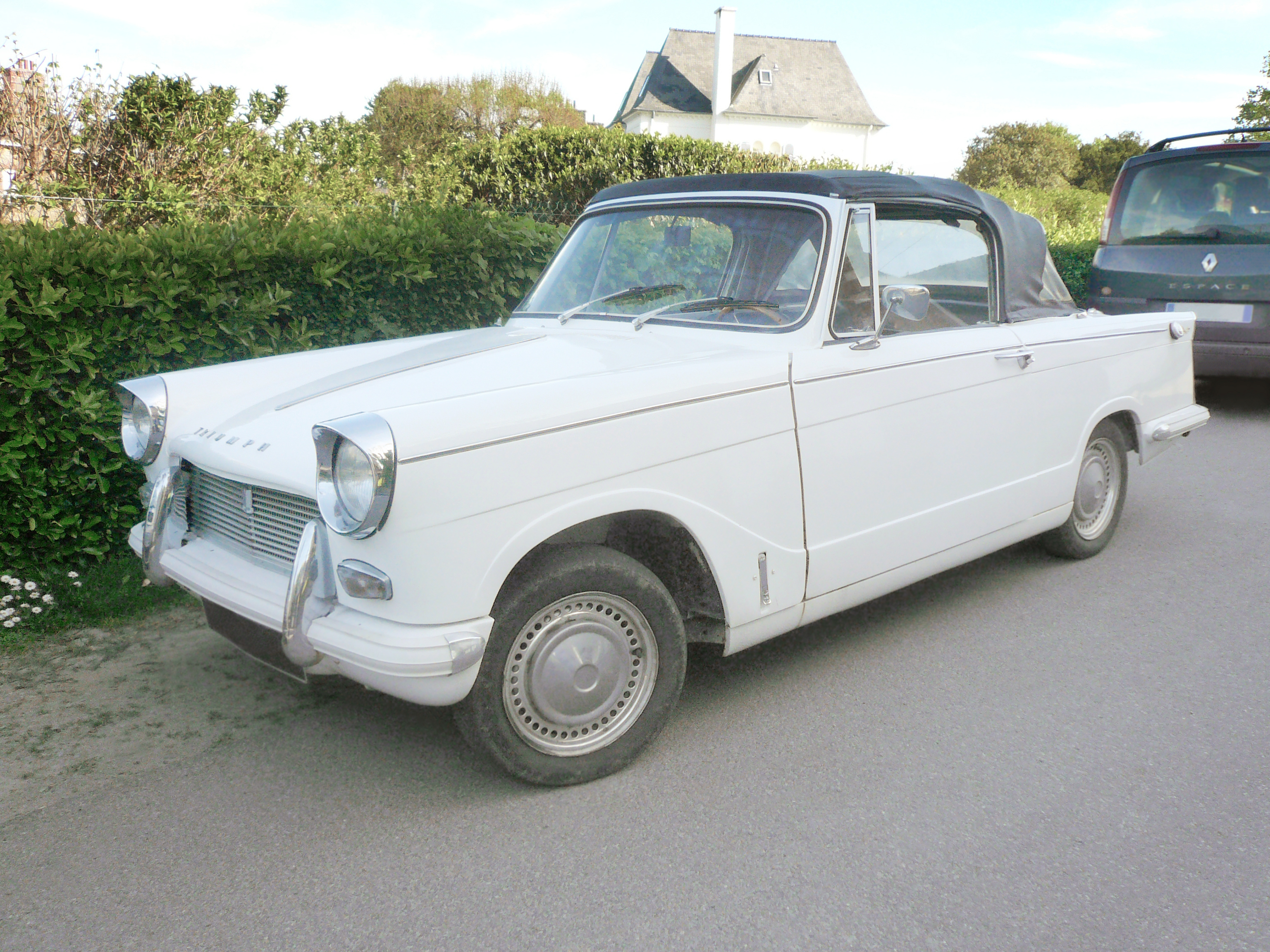 Triumph Herald 1200, avant.